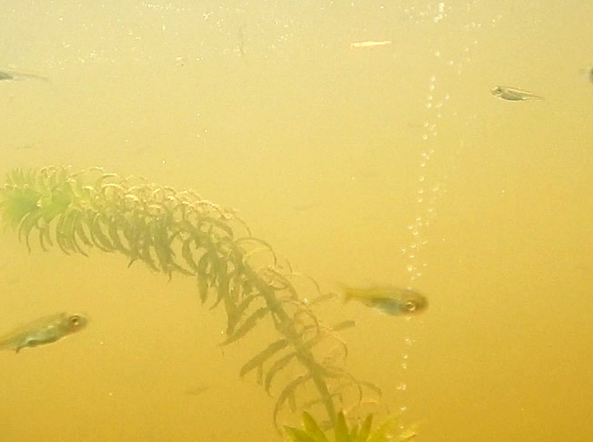 Alevins et bulles d'oxygène natif (issue de la photosynthèse) dans l'Aven (fleuve), à Pont-Aven (Bretagne, France) en Aout 2016